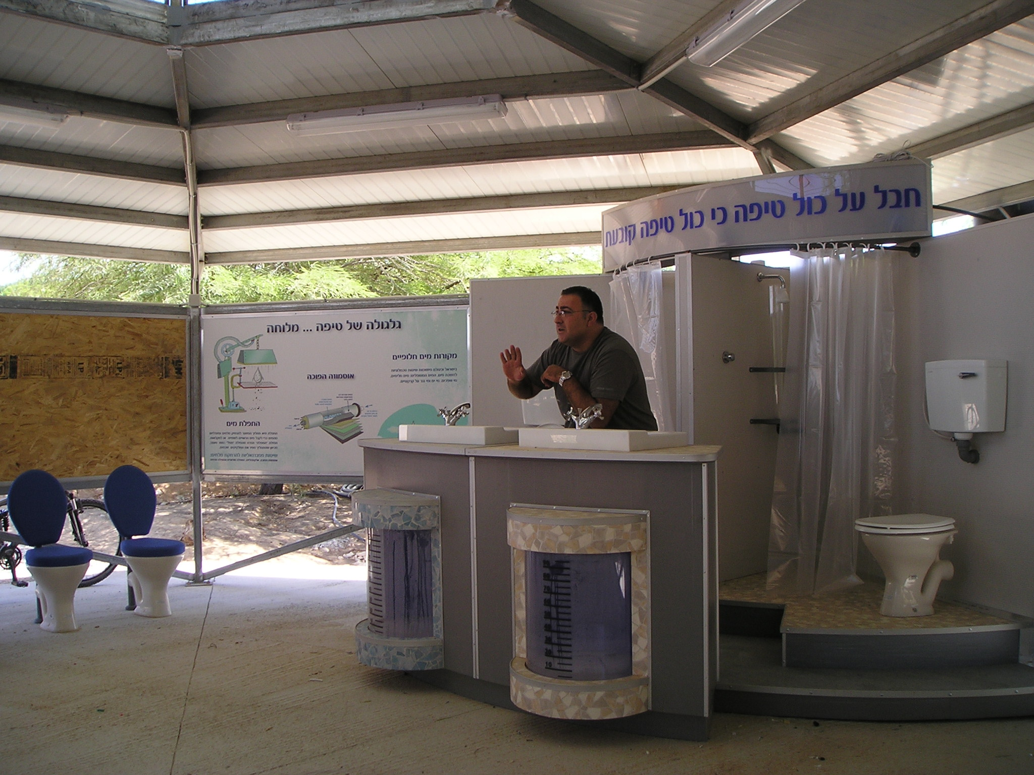 הדרכה לשימוש נבון במים